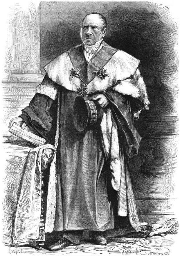 "M. Dupin, sénateur, procureur général près la Cour de cassation, membre de l'Académie française et de l'Académie des Sciences morales et politiques, ancien bâtonnier de l'Ordre des Avocats."